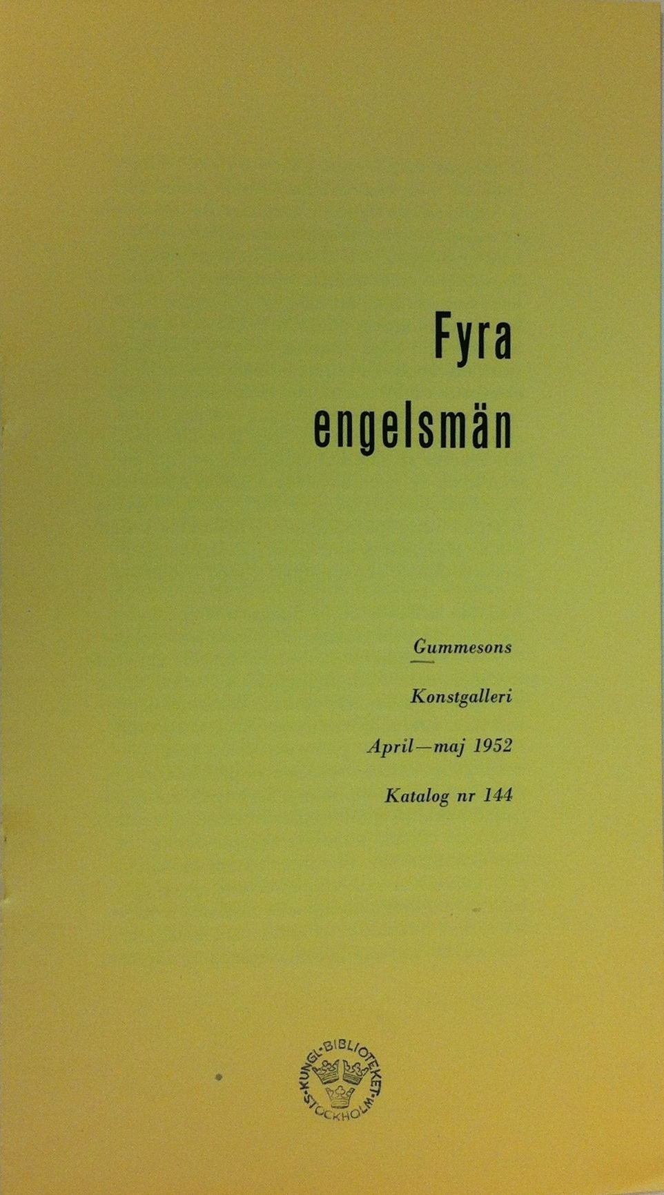 Katalog till utställningen på Galleri Gummeson, april-maj 1952. Privat reproduktion ur Kungliga bibliotekets offentliga samlingar.